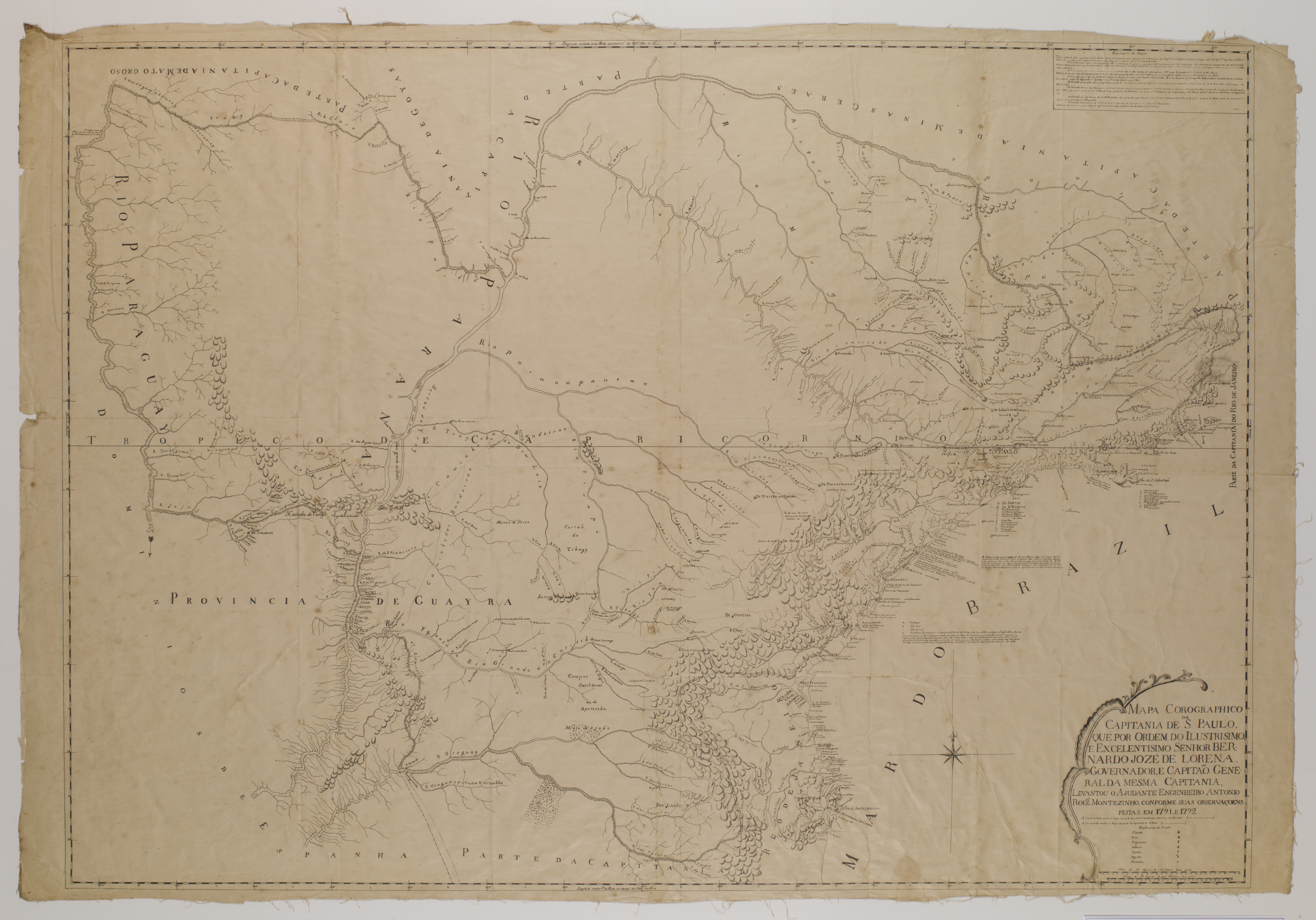 Obra que integra o acervo do Museu Paulista da USP. Coleção João Baptista de Campos Aguirra